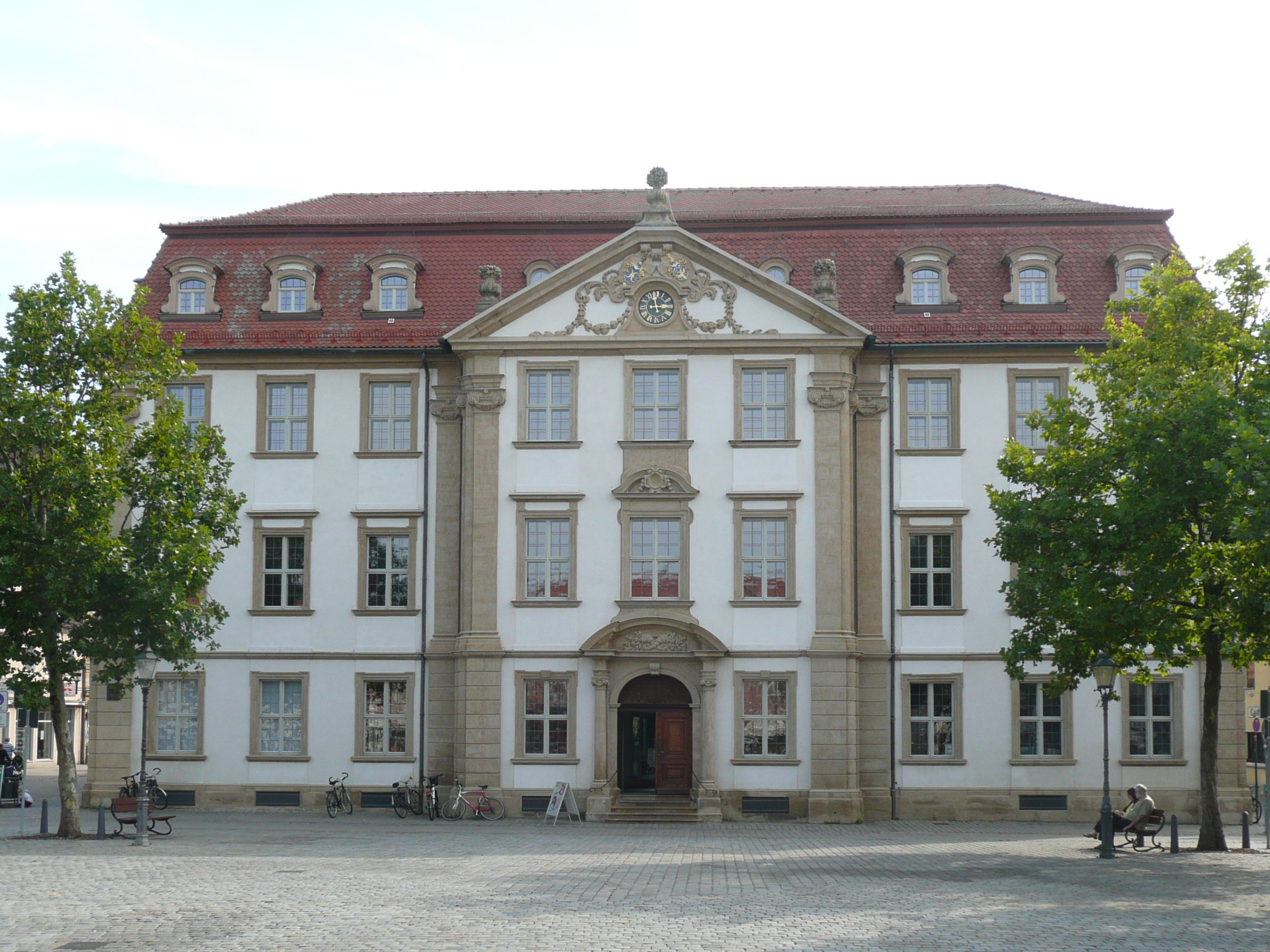 Erlangen, Marktplatz 1, Palais Stutterheim, erbaut 1728/30, zwischen 1836 und 1973 Rathaus, heute Stadtbibliothek und Städtische Galerie, D-5-62-000-427